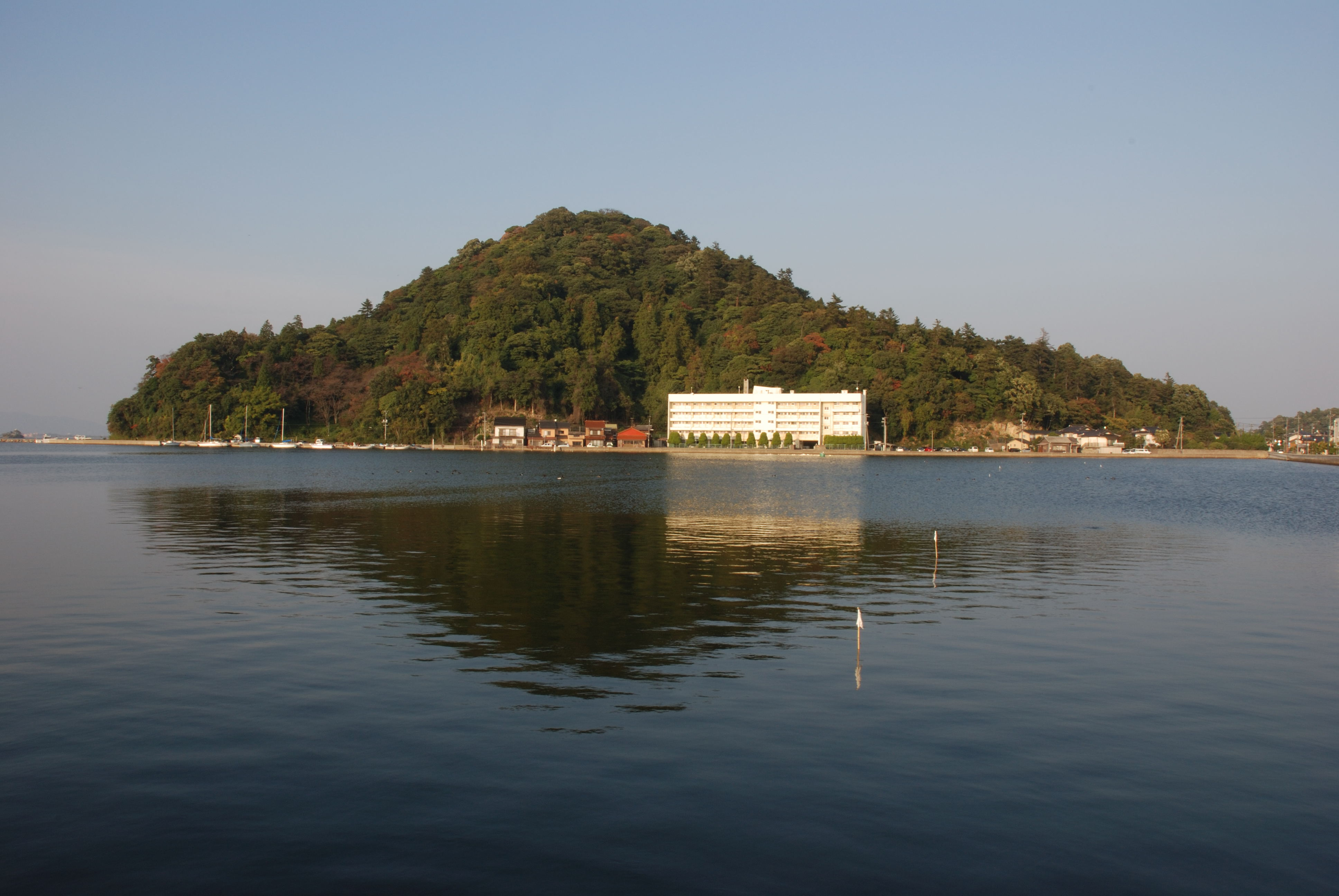 Tokamiyama Castle